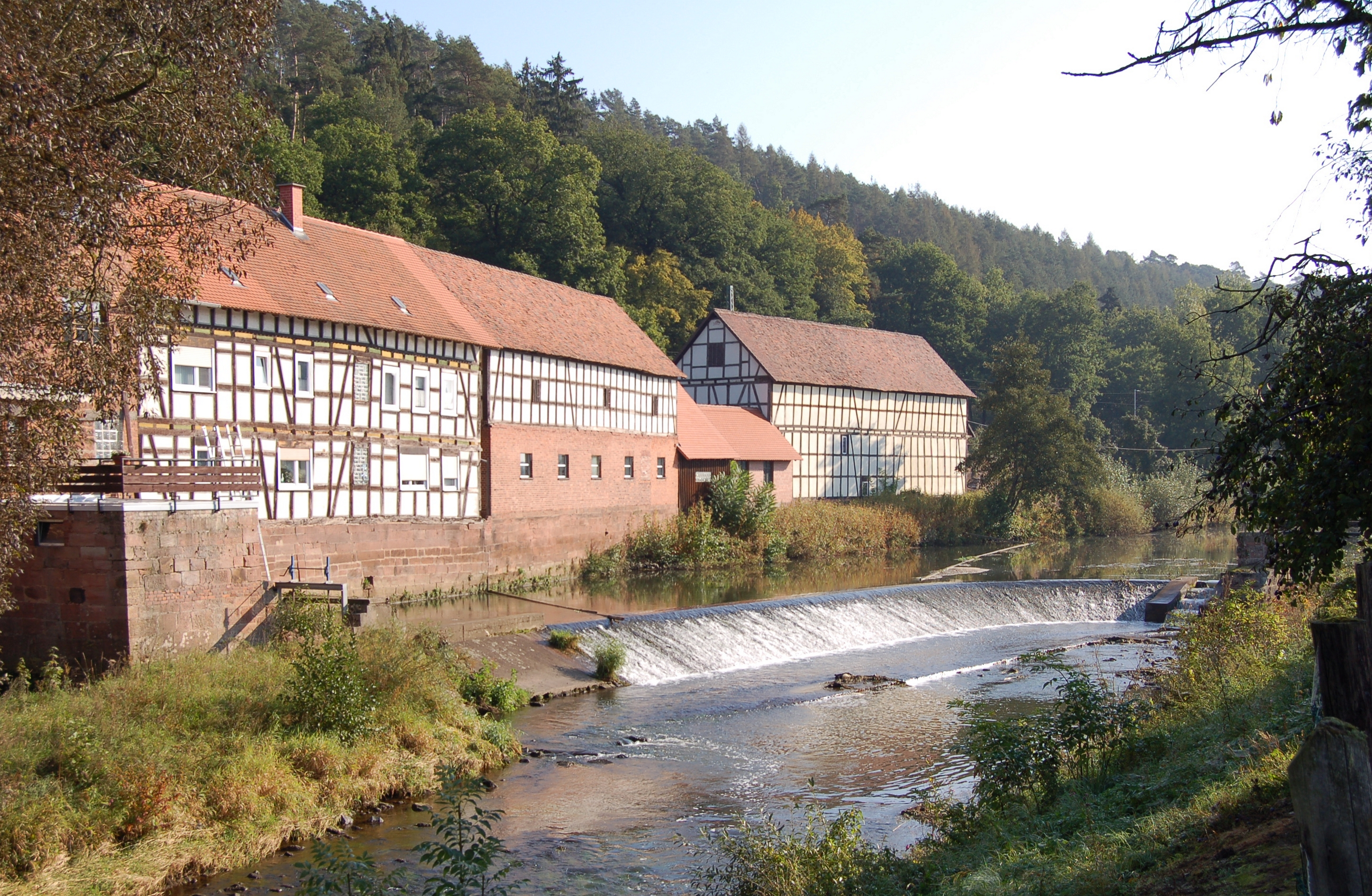 Dieses Foto entstand im Rahmen des Projekts Wiki Loves Monuments Mittelhessen, das aus dem Community-Projektbudget von Wikimedia Deutschland e. V. gefördert wurde.